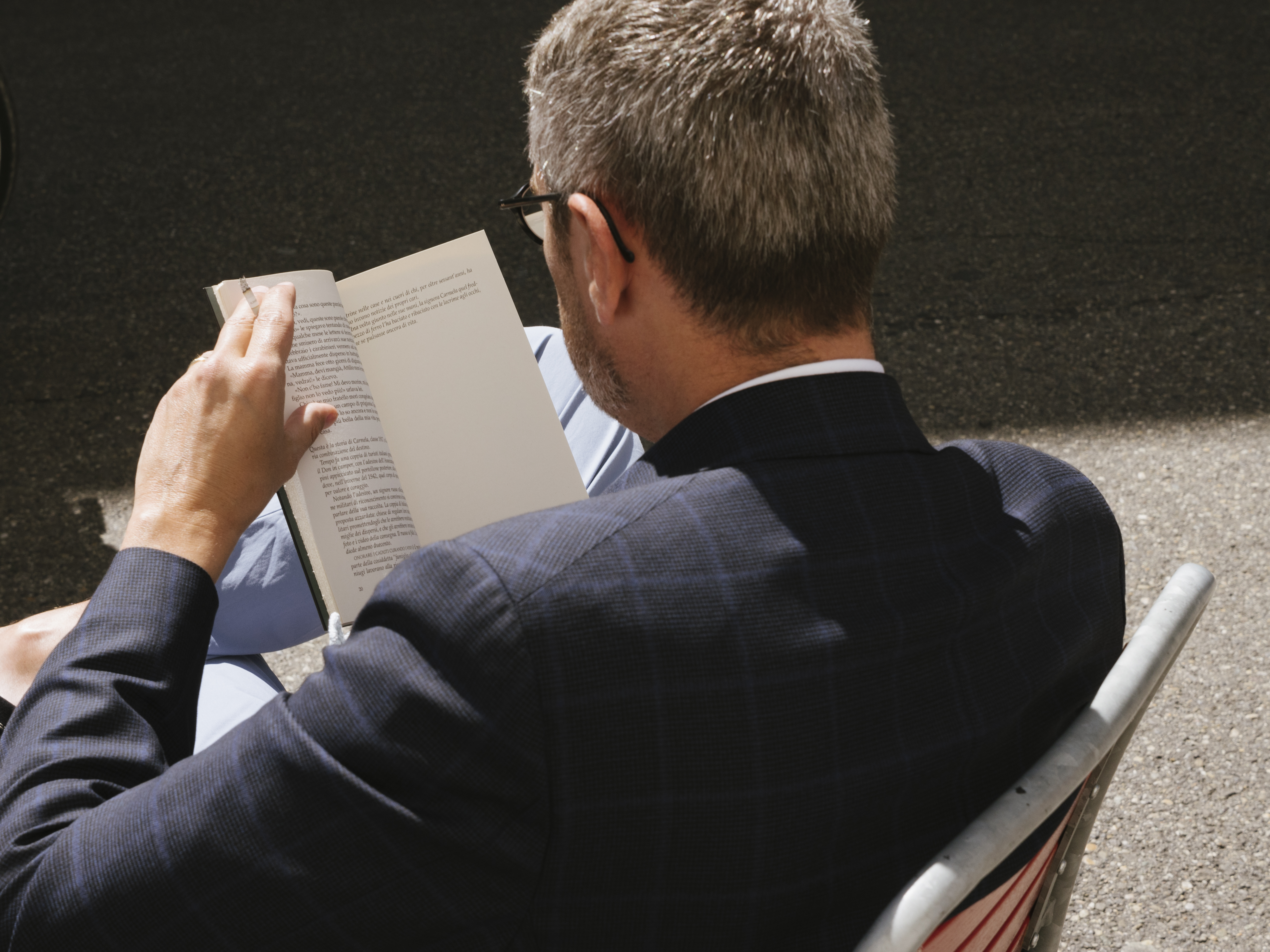 Stimmung Fabiano Alborghetti 2 © Luca Bricciotti